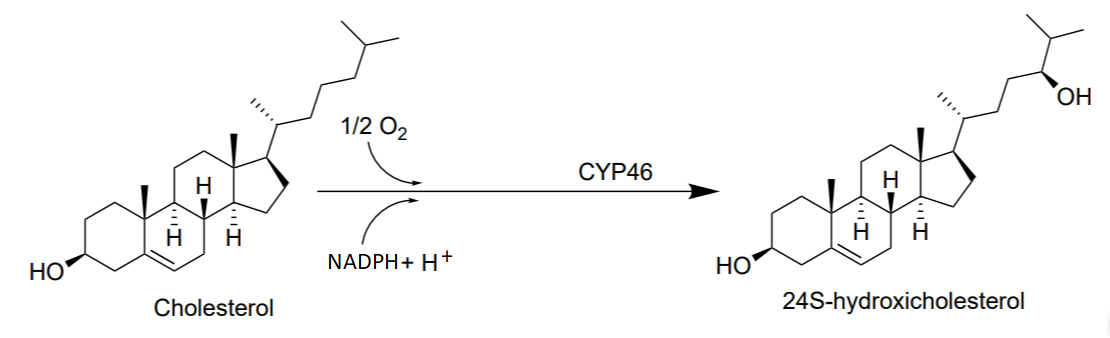 Transformación del colesterol al cerebrosterol mediante la encima CYP46.